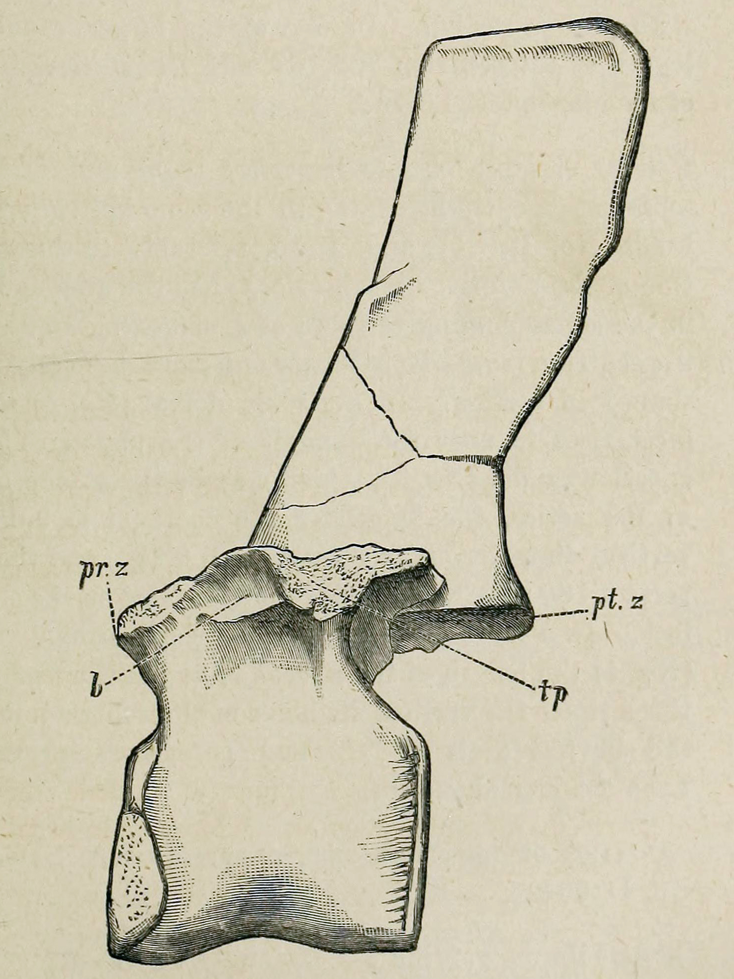 Middle dorsal vertebra of Barilium dawsoni.